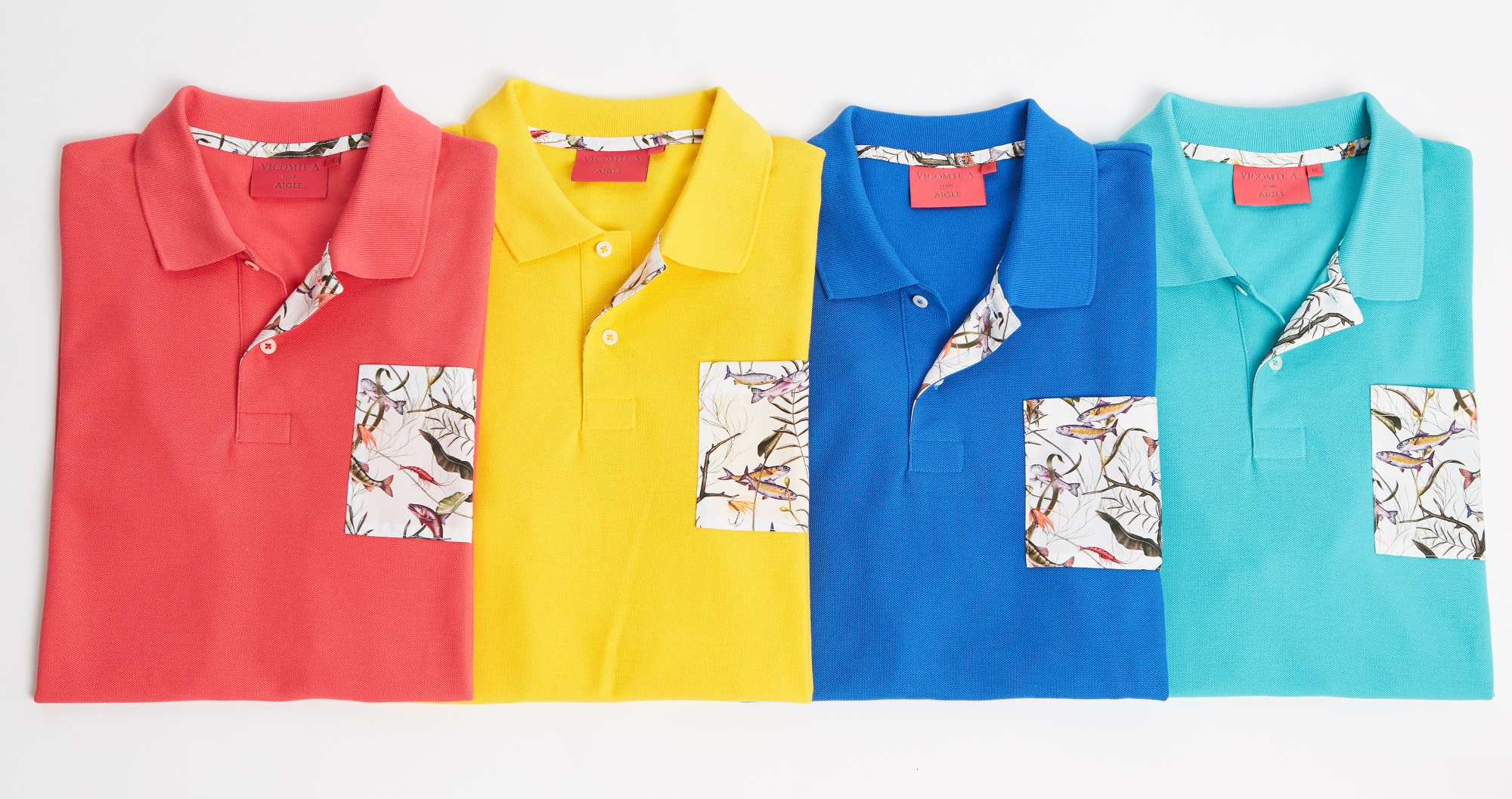 photo polo VICOMTE A.